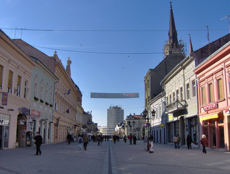 Змај Јовина улица у Новом Саду